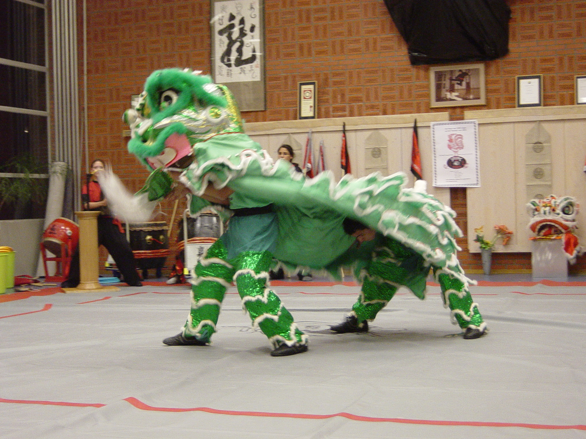 Löwentanz.